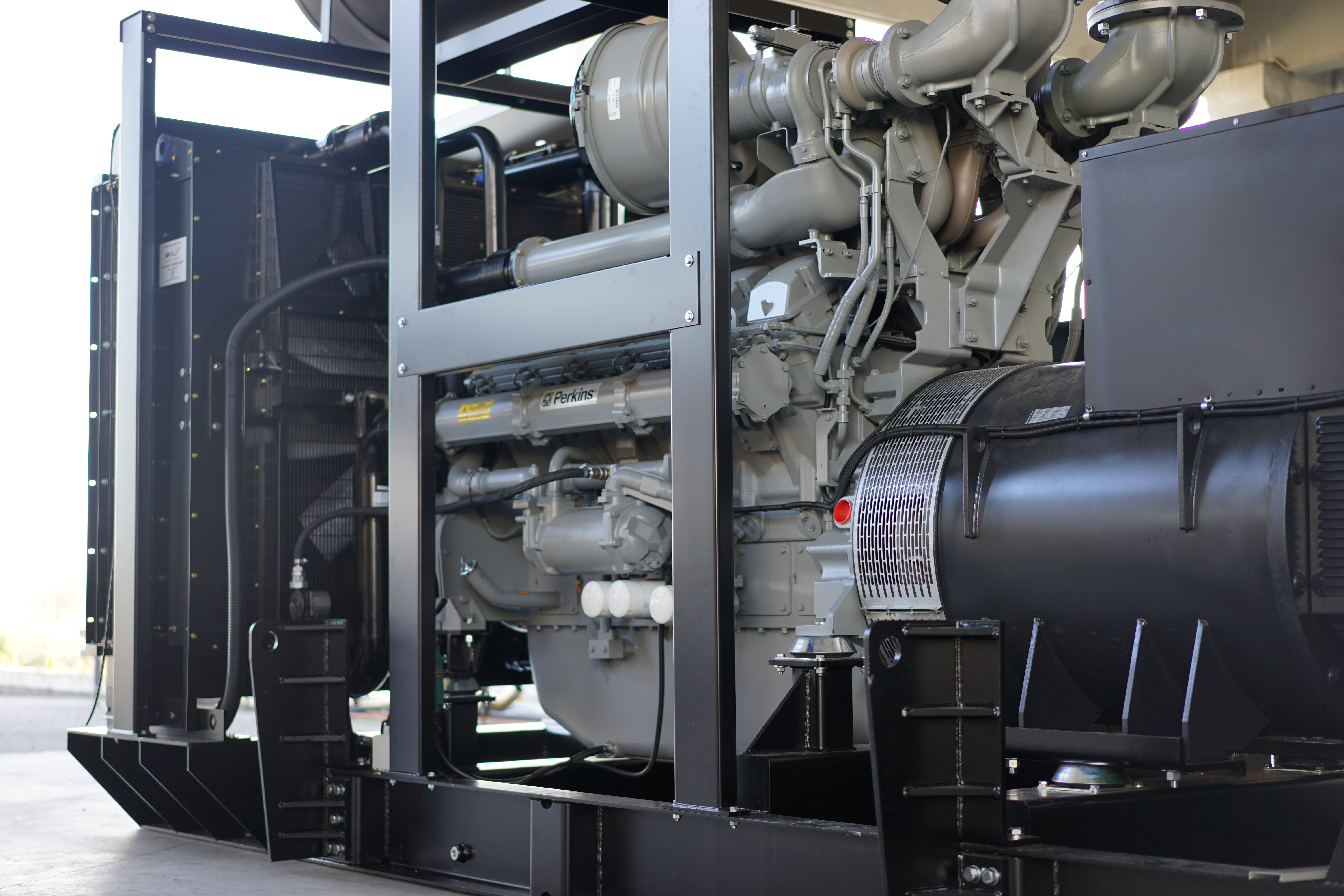 Diesel-Notstromaggregat 1750 kVA mit 12-Zylinder Perkins Dieselmotor der 4000 Serie.